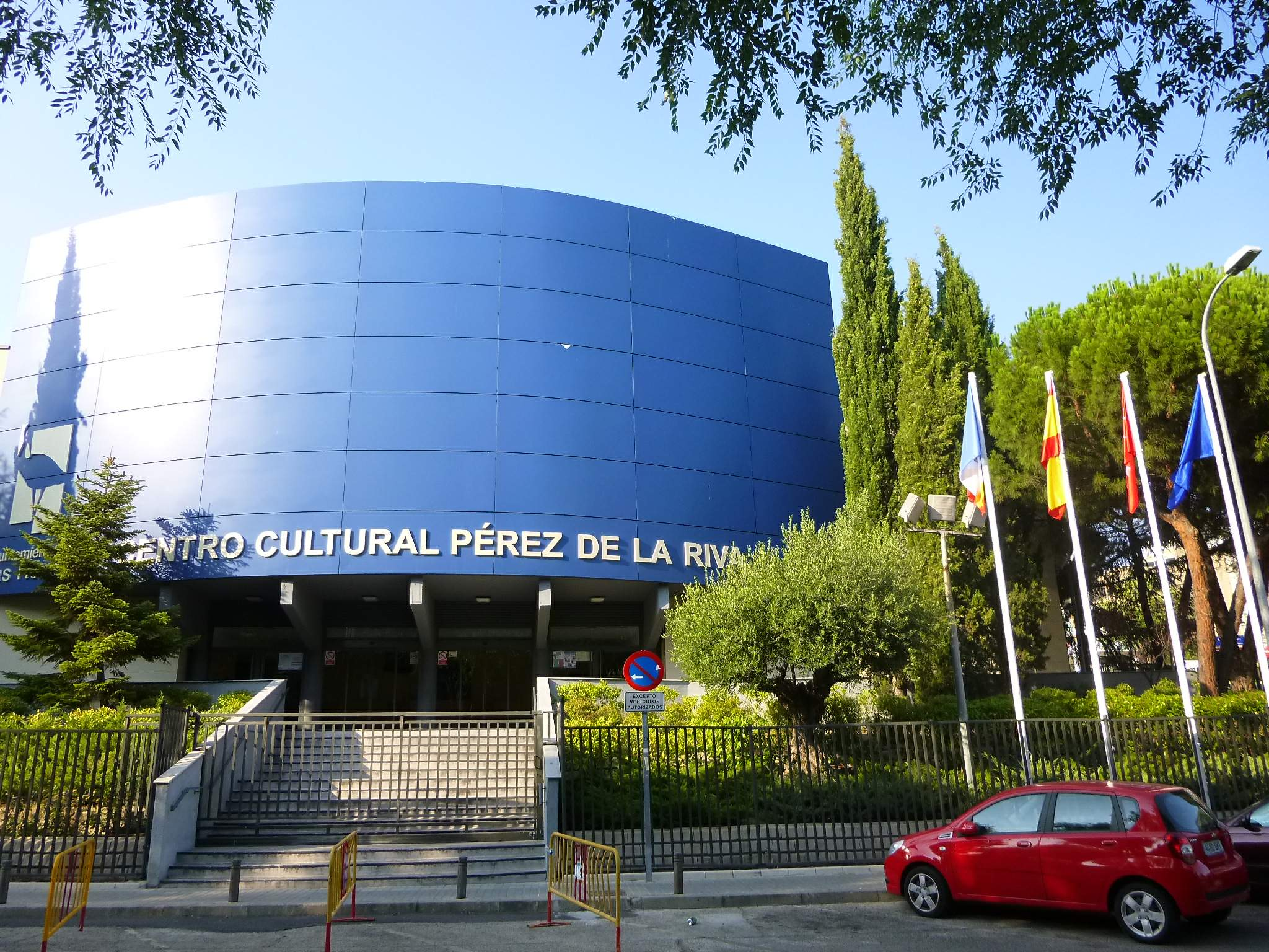 Centro Cultural Pérez de la Riva (Las Rozas, Madrid)